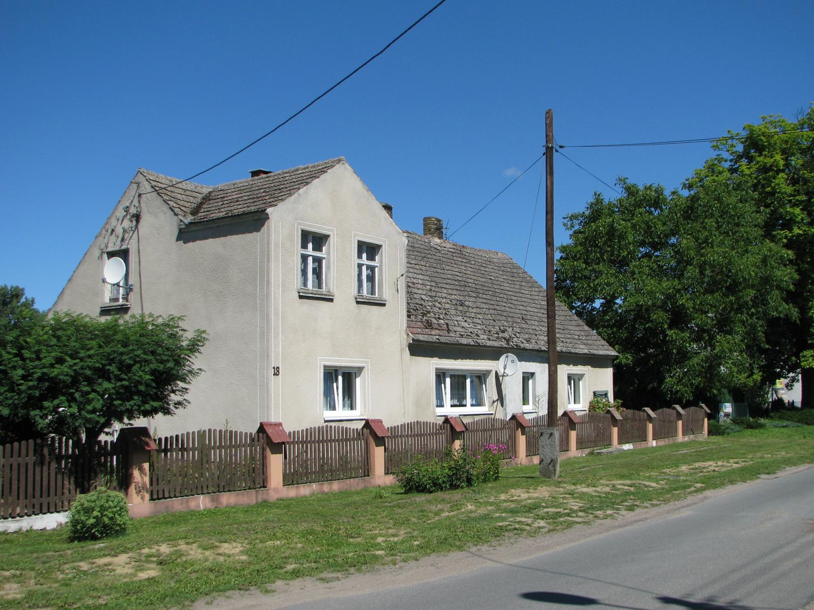 Wojcieszyce. Zabytkowy dom przy ul. Strzeleckiej